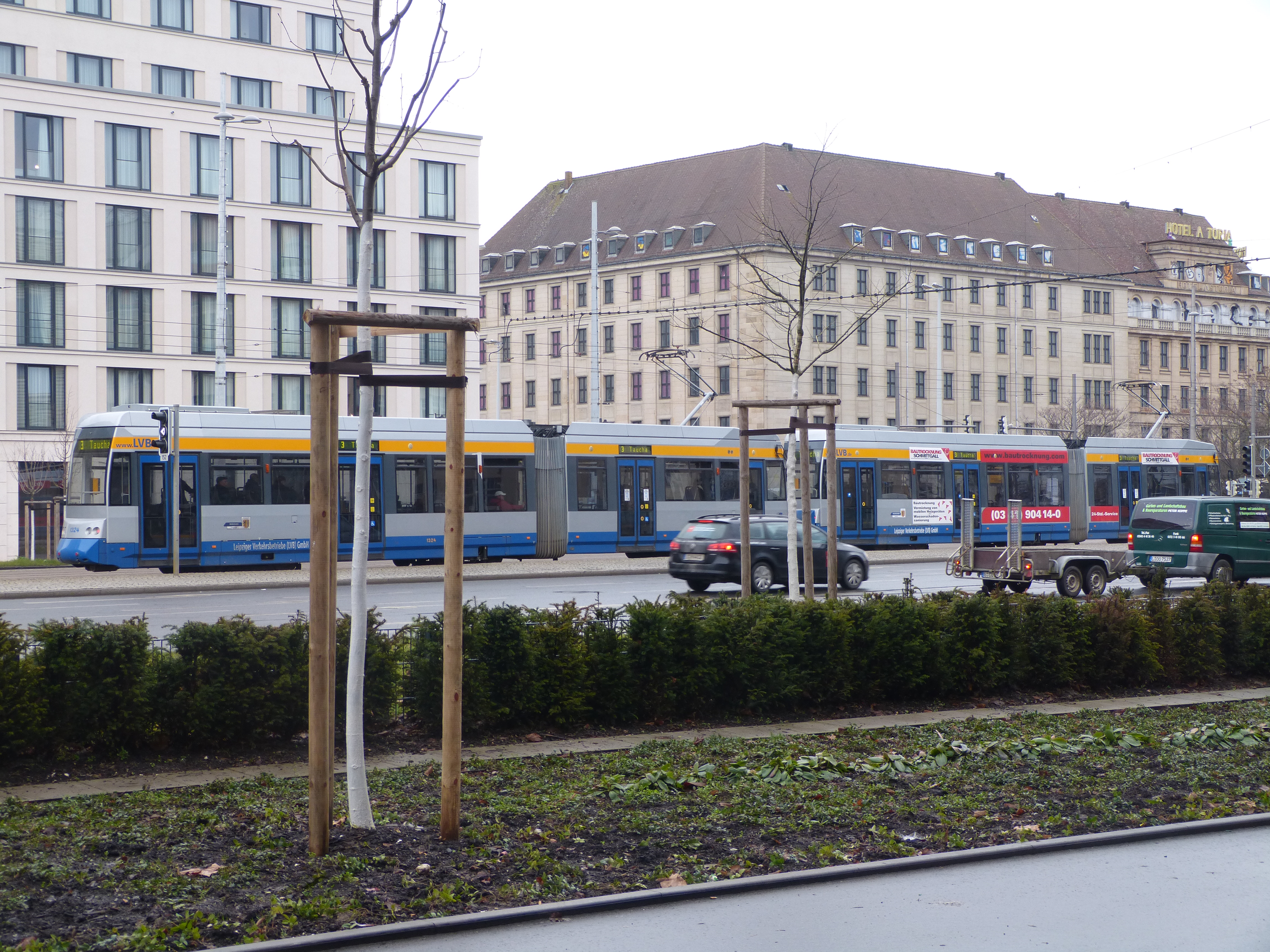 Ein NGTW6 (Leoliner) auf der Linie 3 (Knautkleeberg - Taucha) am Trondlingring